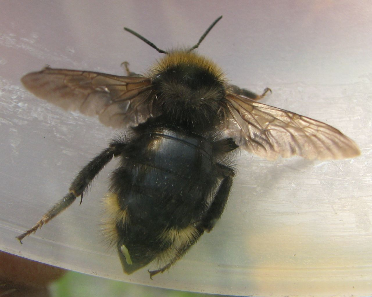 Åkergjøkhumledronning Bombus campestris med tydelig artskjennetegn gule hår på hver side av bakstussen.